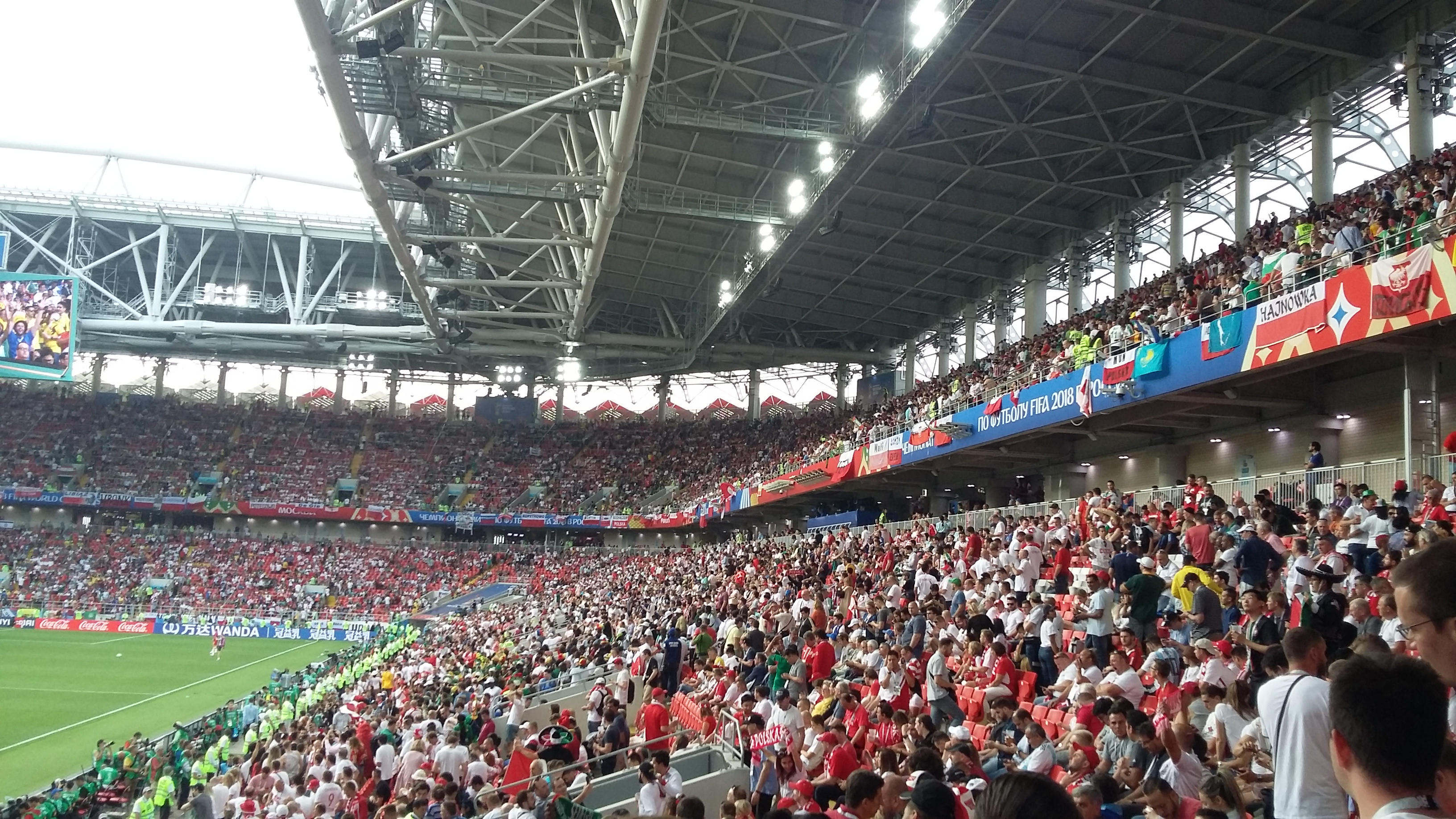 Трибуна стадиона Спартак после матча Польша - Сенегал 19 июня 2018.